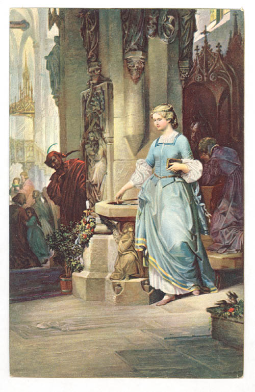 Gretchen in der Kirche(aus Goethe's Faust)